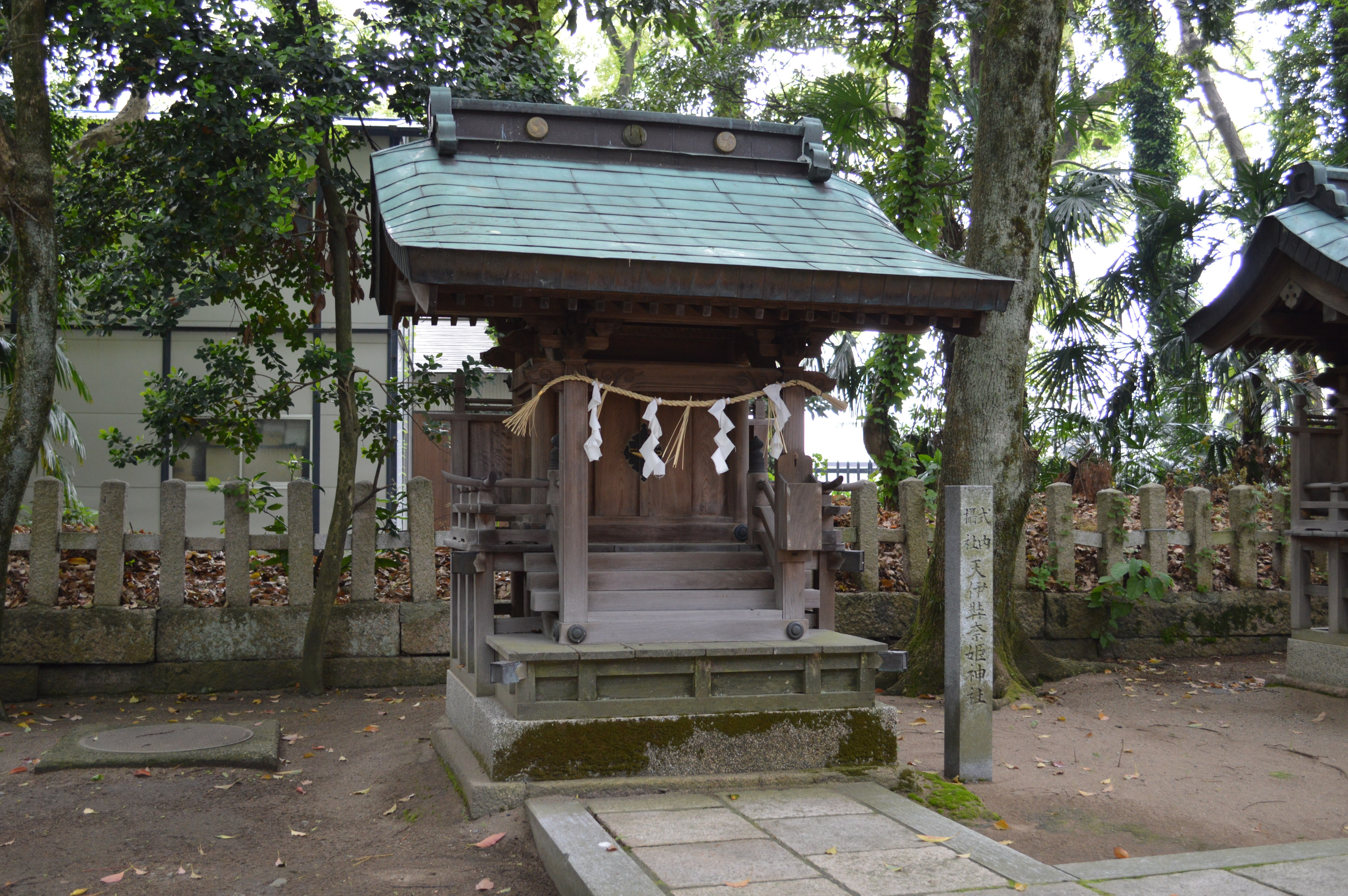 天伊弉奈姫神社 (氣比神宮境内摂社)